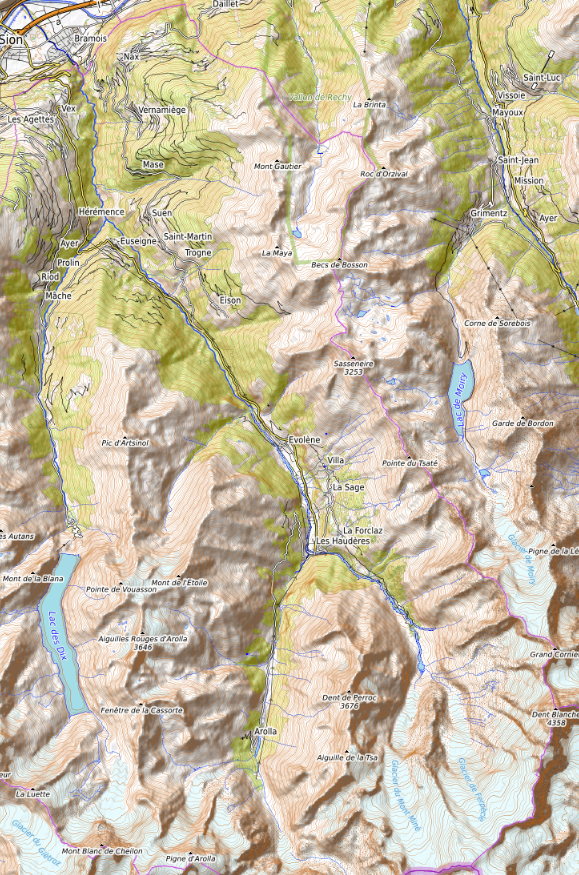 carte réalisée sur umap This map may be incomplete, and may contain errors. Don't rely solely on it for navigation.